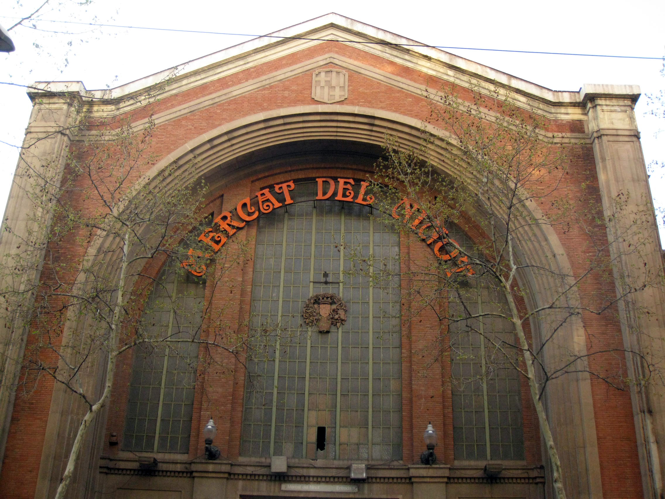 Mercat del Ninot (Barcelona) Object location41° 23′ 16.22″ N, 2° 09′ 15.93″ E